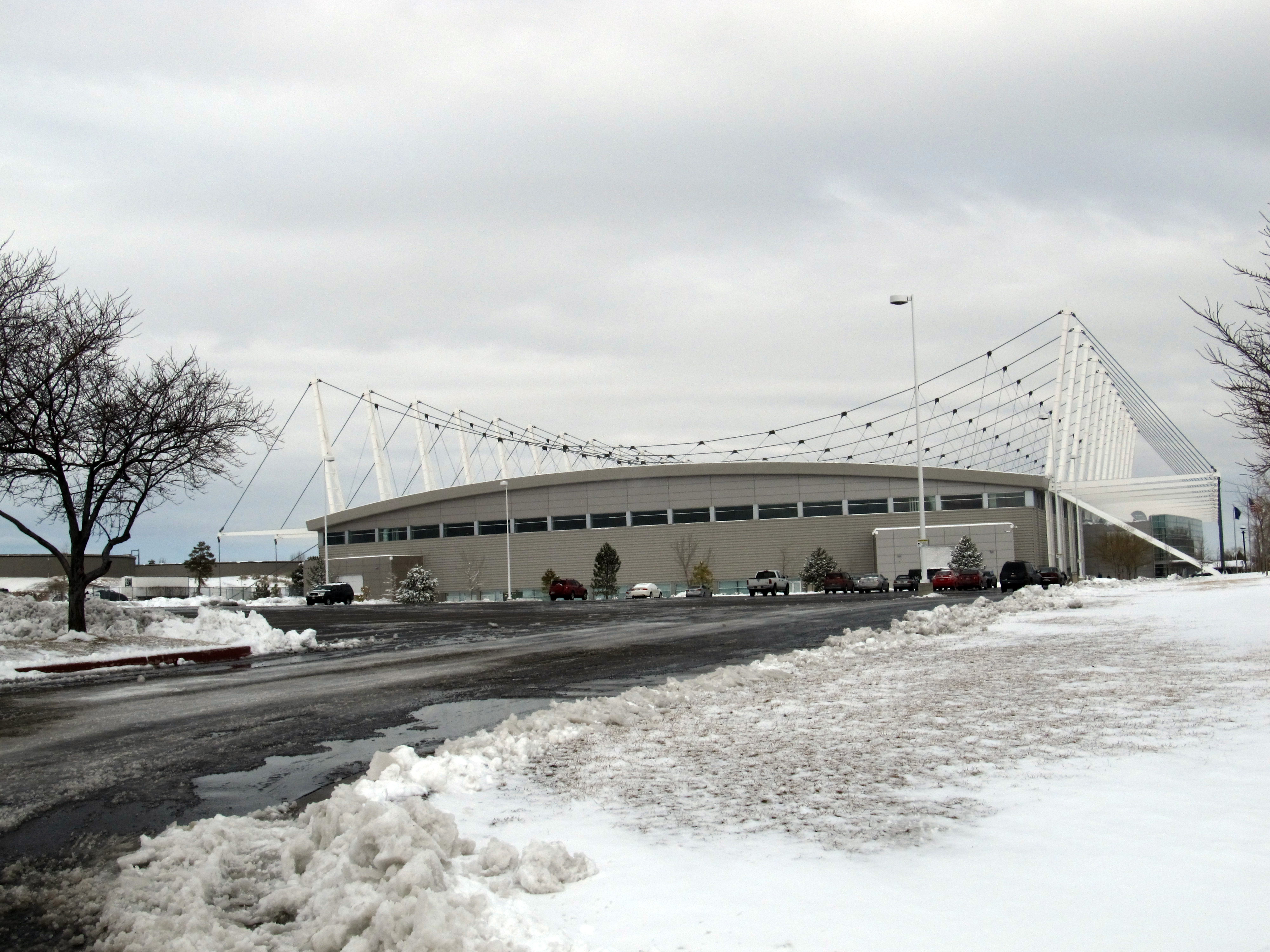 Utah Olympic Oval, Kearns, Utah (4)